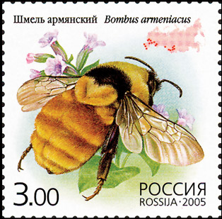 Bombus armeniacus